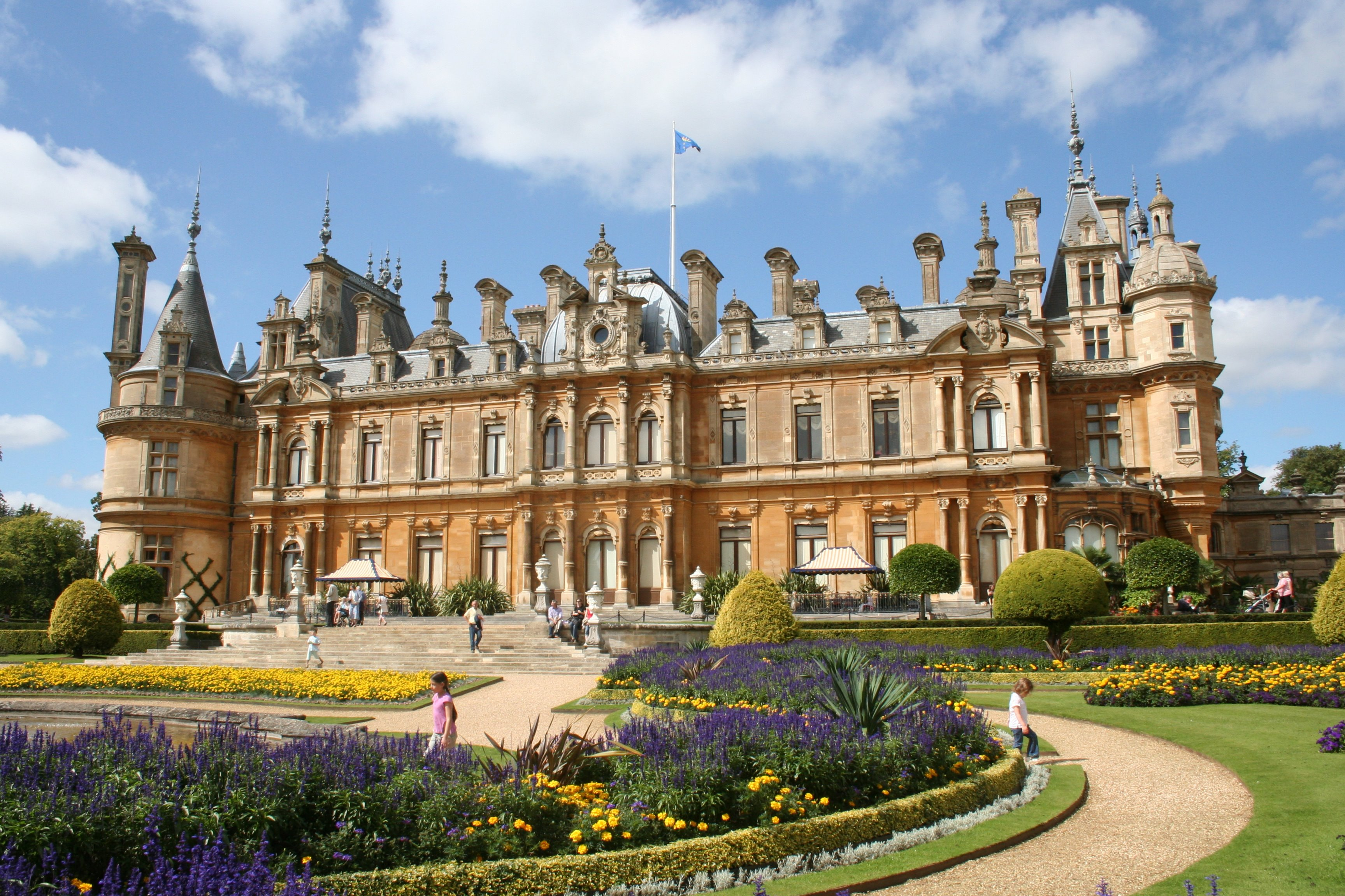 Waddesdon manor facade.